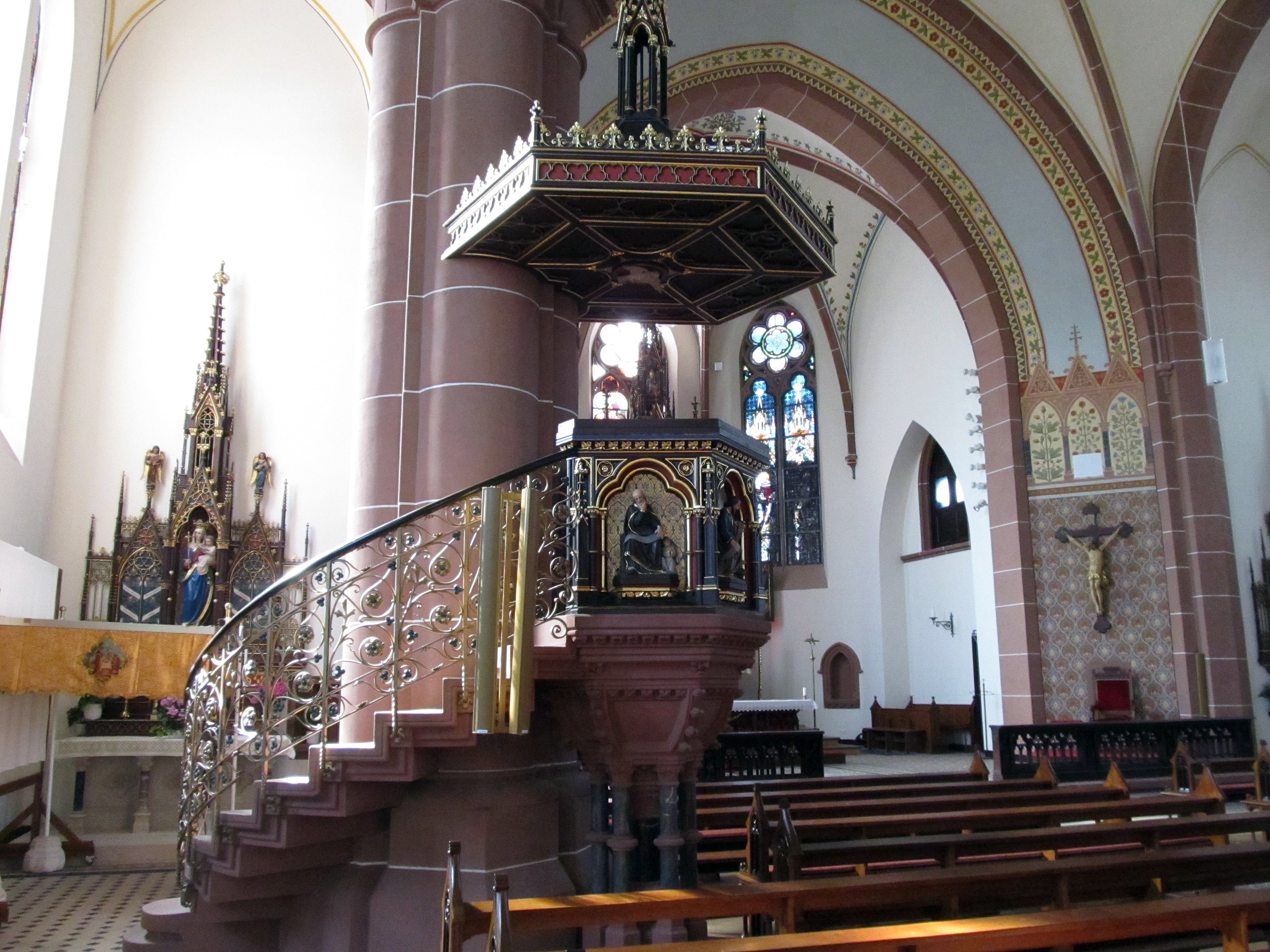 Die Kanzel in der Kirche St. Josef in St. Ingbert